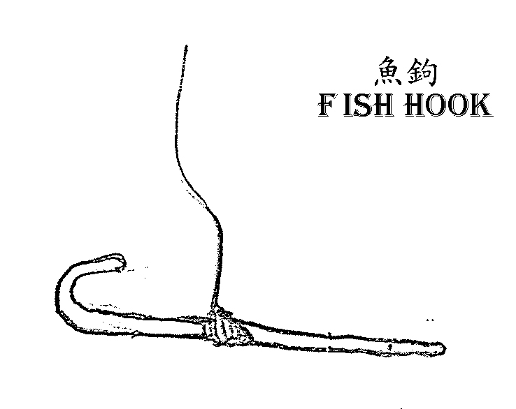 塔斯卡洛人使用的魚鉤